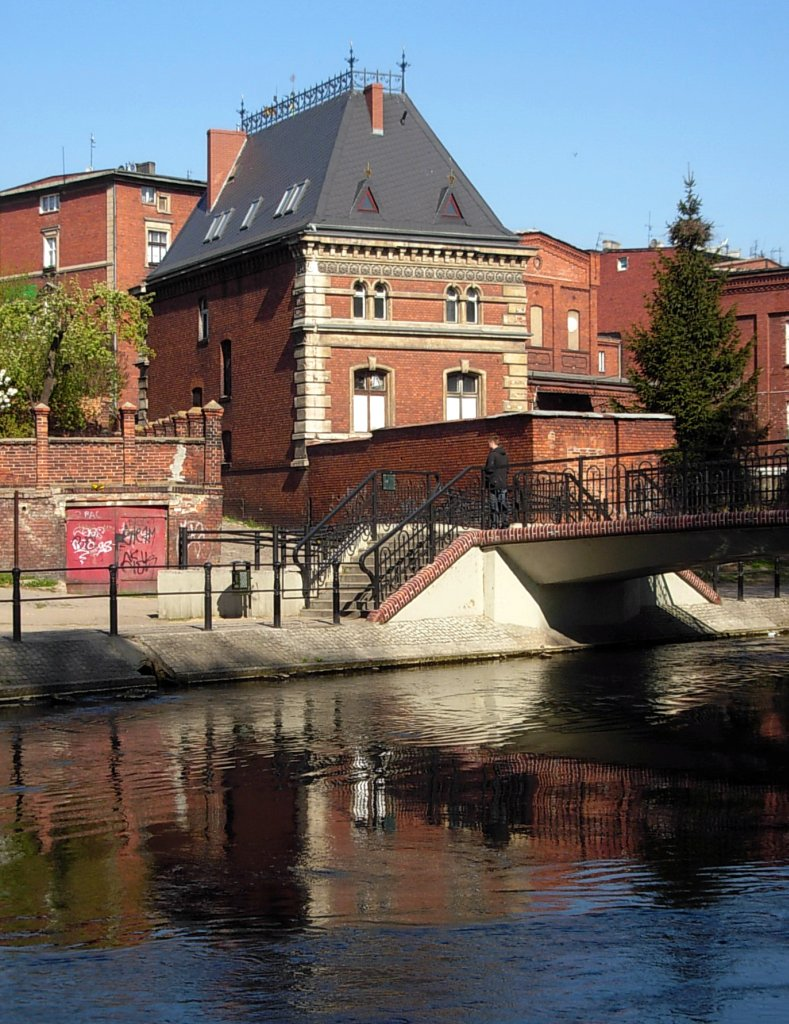 Dawna rafineria spirytusu CA Franke nad Młynówką w Bydgoszczy